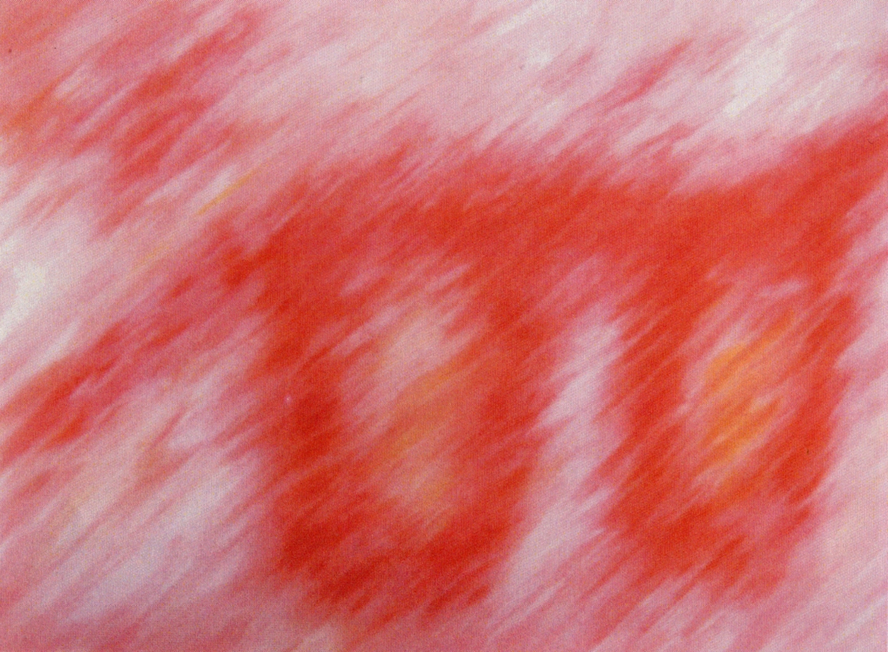 Pictură în acrilic pe pânză denumită „Zborul îngerilor” - 79/60, 2005